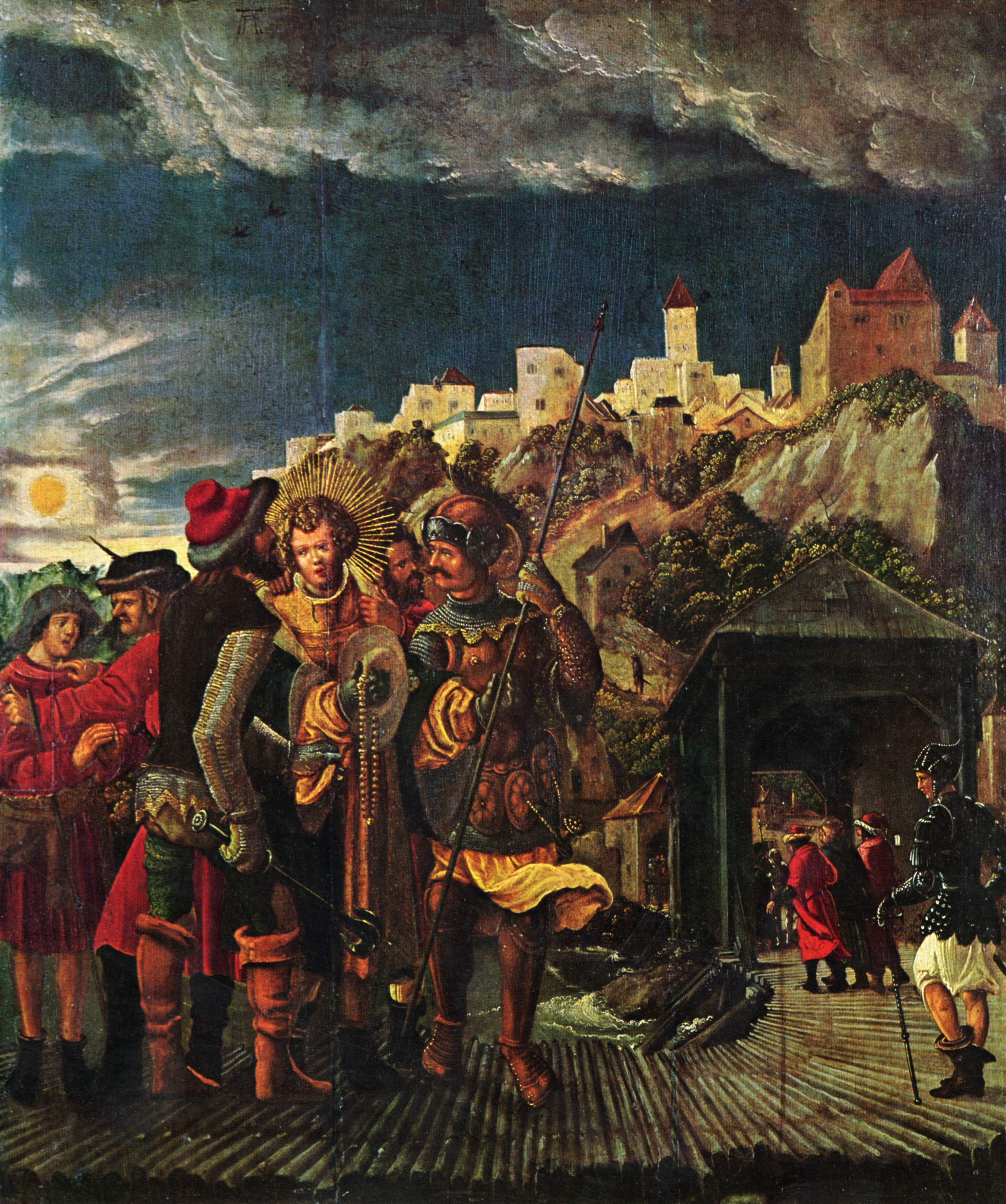 Cattura di san floriano